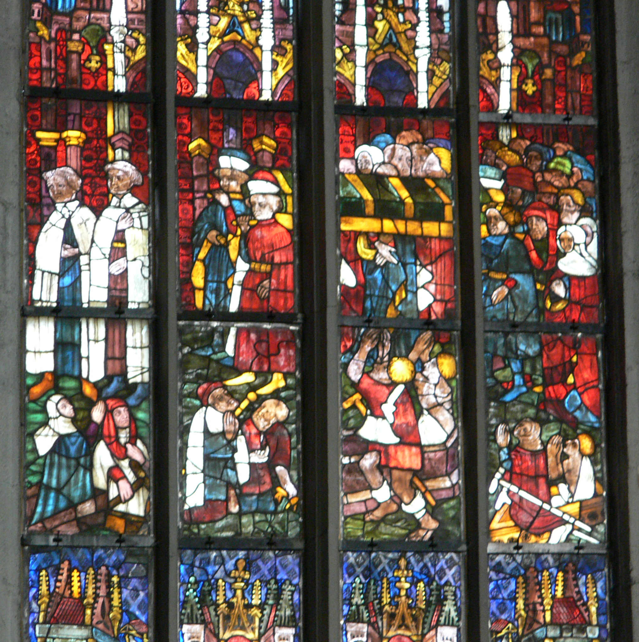 Stadtpfarrkirche St. Maria Magdalena, Münnerstadt Elisabethfenster, um 1420, Detail: Leichenzug Elisabeths von Thüringen